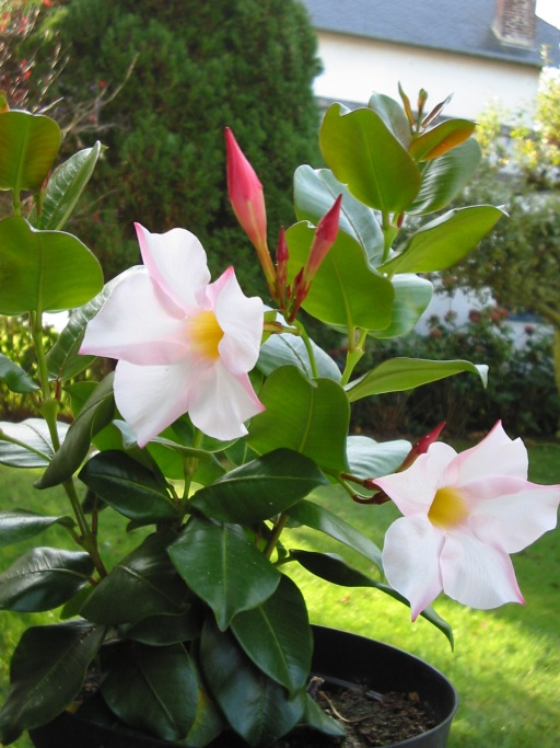 Dipladenia, Dieppe